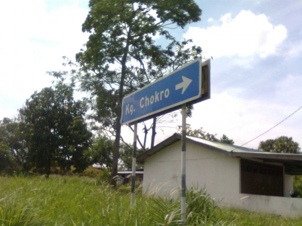 Gambar signboard kg chokro